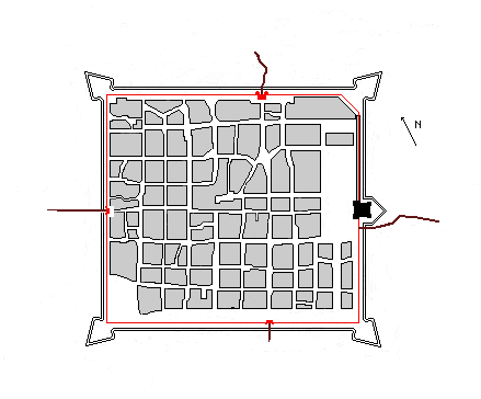 Torino nel 1550